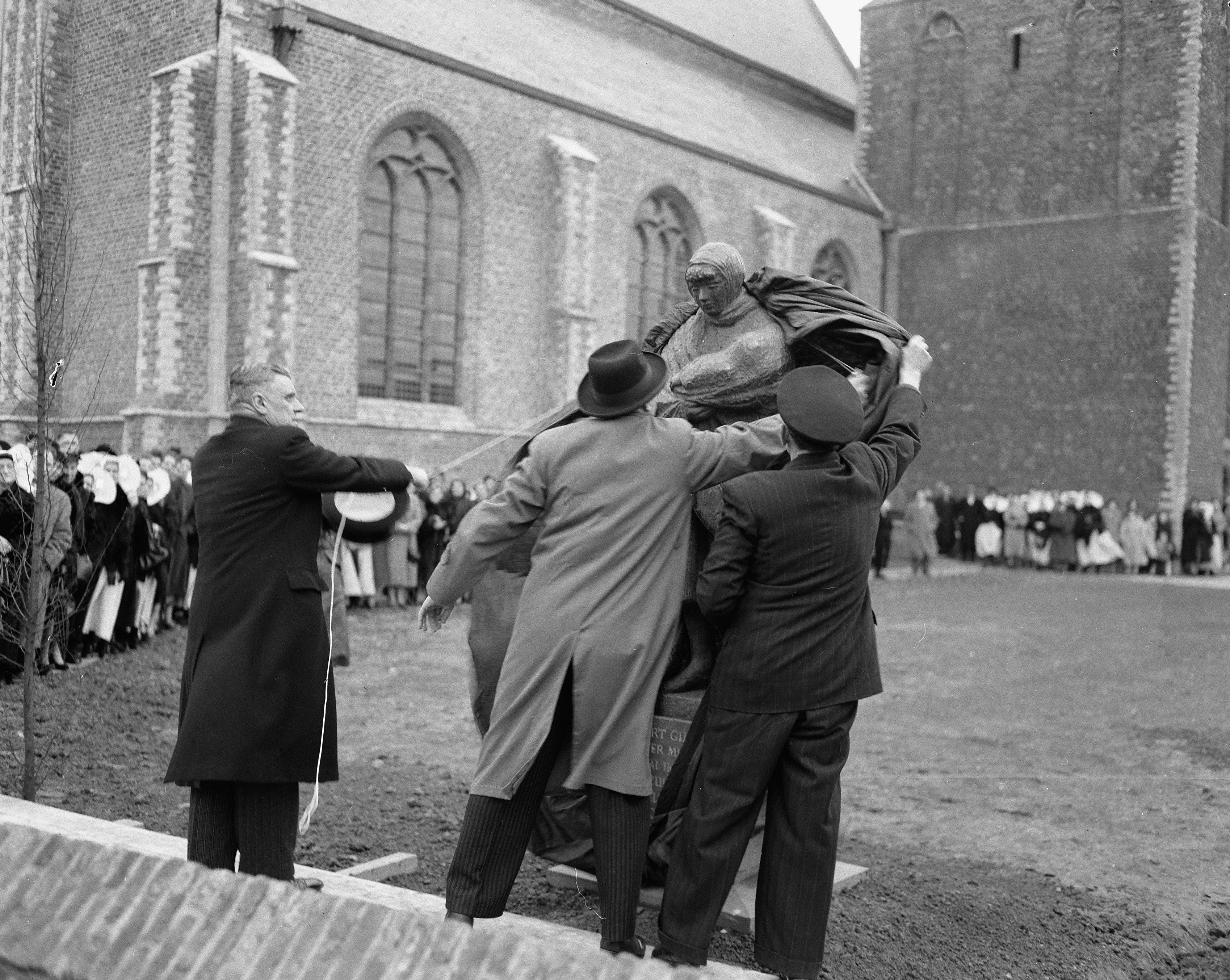 Collectie / Archief : Fotocollectie Anefo Reportage / Serie : [ onbekend ] Beschrijving : Commissaris der Koningin van Zeeland onthult watersnoodbeeld te Kruiningen Datum : 1 februari 1957 Locatie : Kruiningen Trefwoorden : onthullingen, watersnoodbeelden Fotograaf : Behrens, Herbert / Anefo Auteursrechthebbende : Nationaal Archief Materiaalsoort : Negatief (zwart/wit) Nummer archiefinventaris : bekijk toegang 2.24.01.04 Bestanddeelnummer : 908-2890 Reacties Geplaatst door Zeeuwsmeisje op 04 mei 2016 - 21:41. Jhr. mr. A.F.C. de Casembroot. Het beeld is ontworpen door Jan Wolkers.